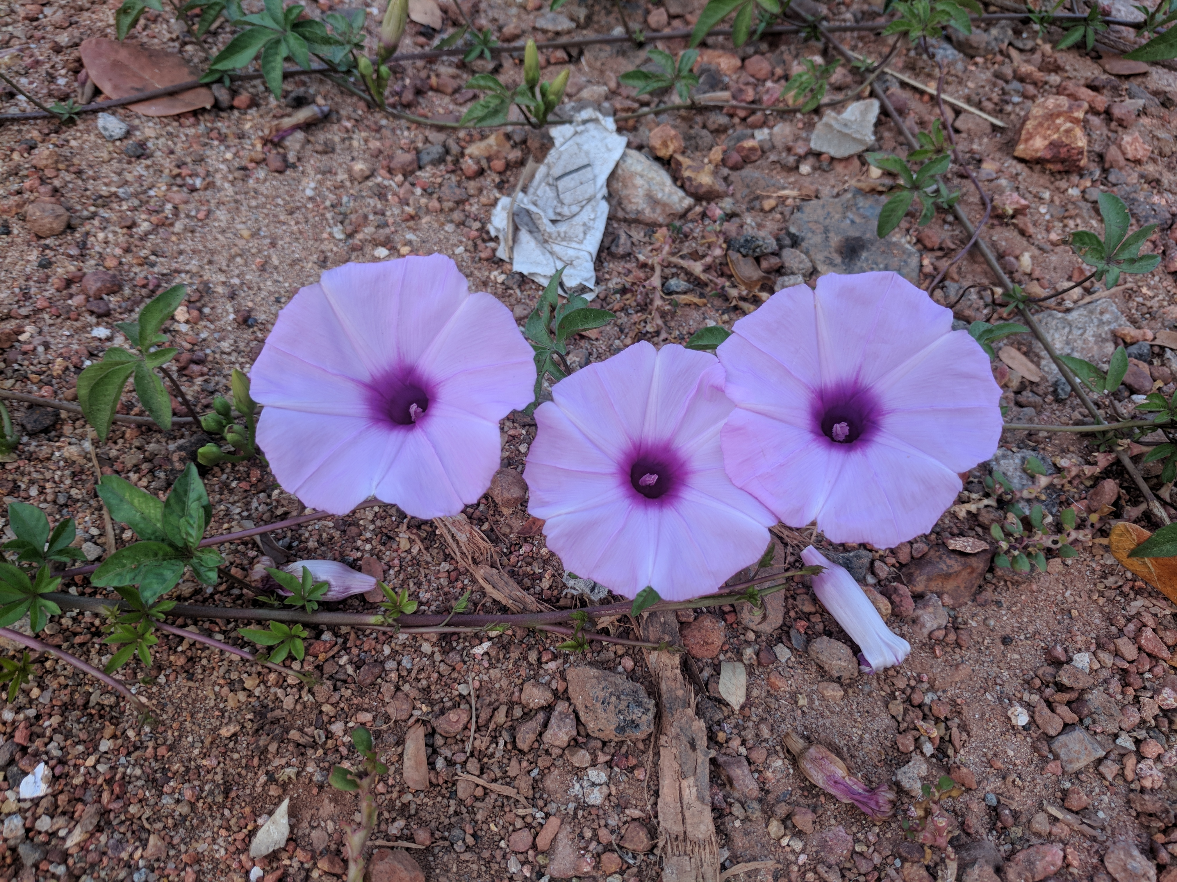 Ipomoea cairica